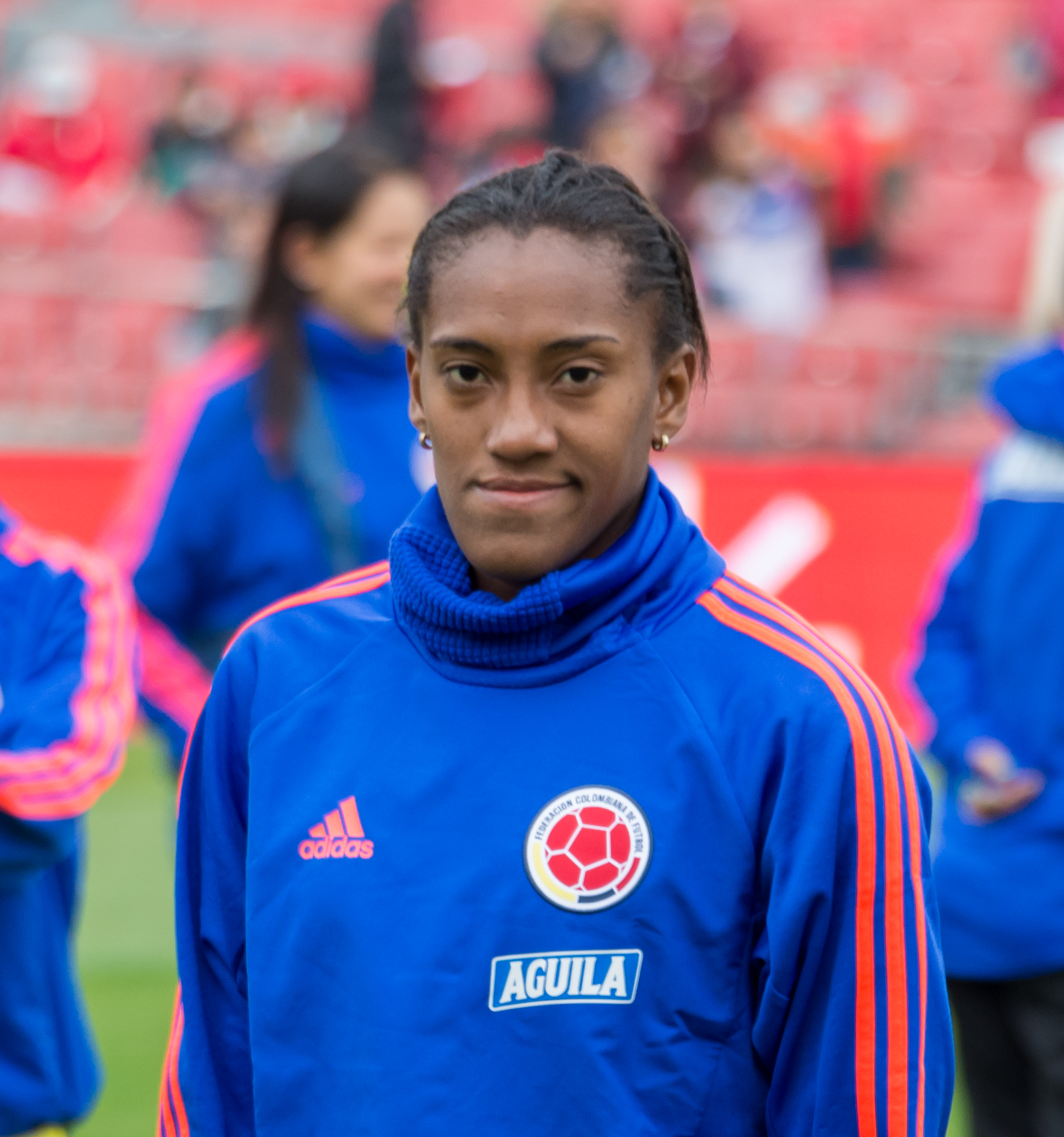 Daniela Caracas, Chile v Colombia, Estadio Nacional, Ñuñoa, Santiago, Chile.